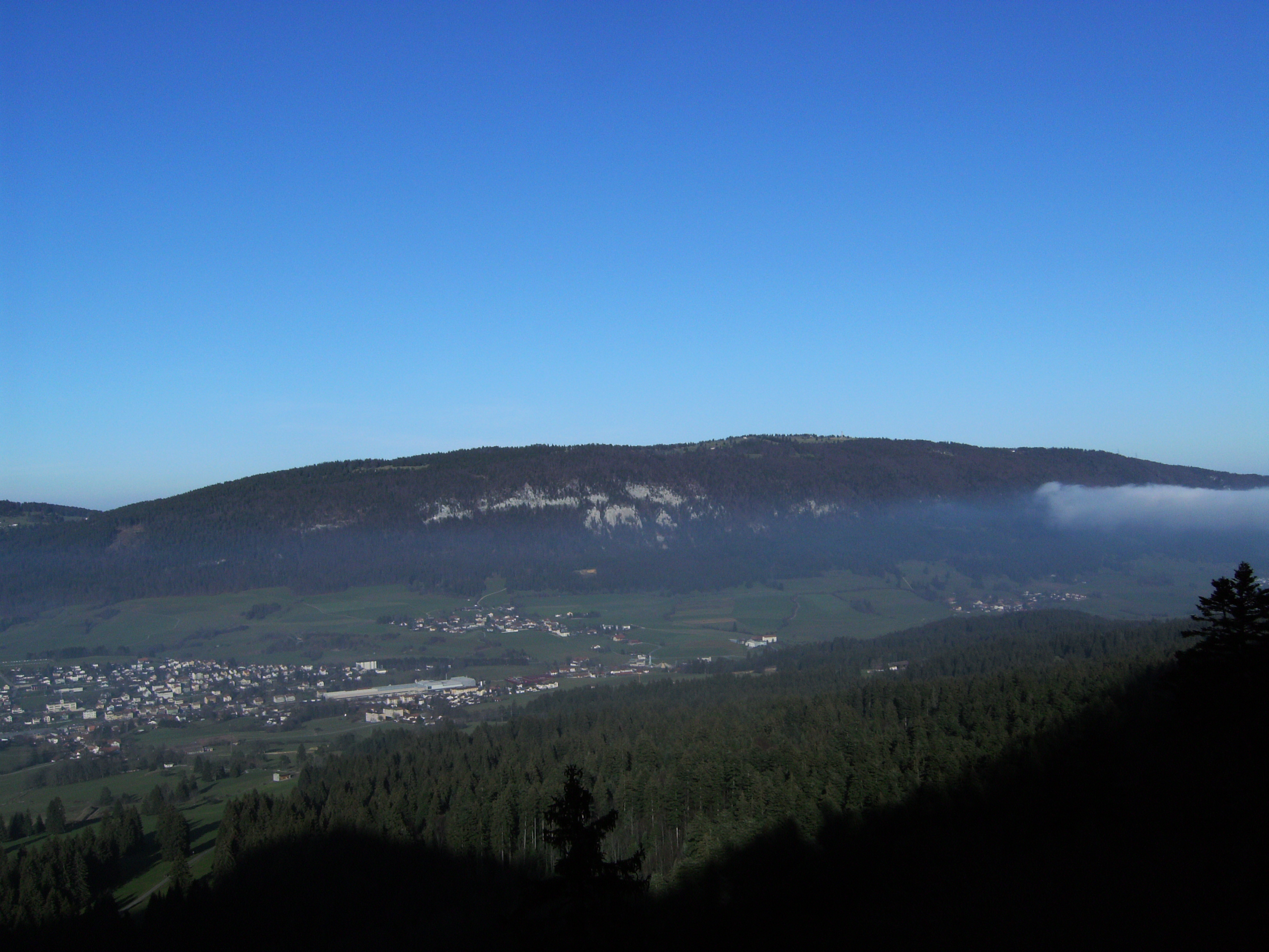 Prise de vue de la montagne du Moron (canton de Berne, Suisse). Les communes sont : Reconvilier (à gauche), Loveresse (en dessous des rochers) et Pontenet (à droite en-dessous du nuage). Prise de la photo : depuis Montoz en direction du nord-est.